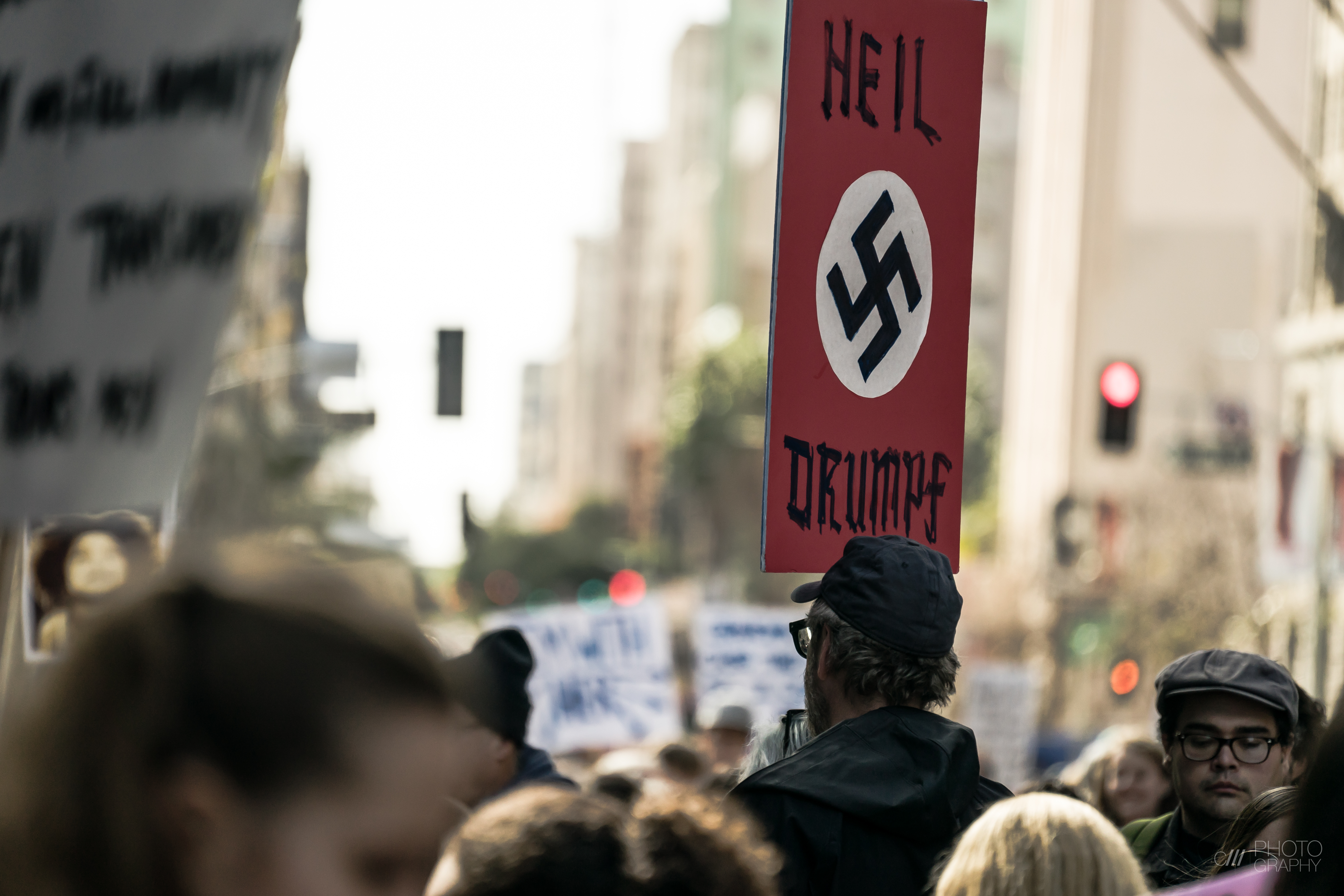 Heil Drumpf